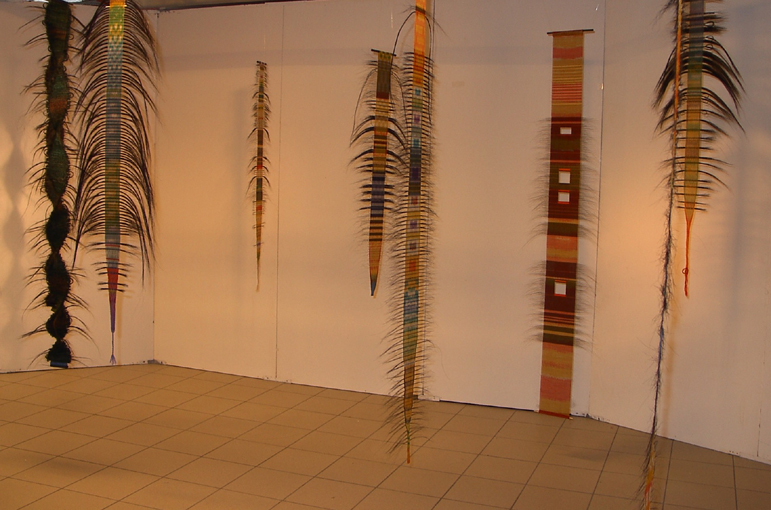 Textilt konsthantverk & Design 2005. Textil utsmyckning